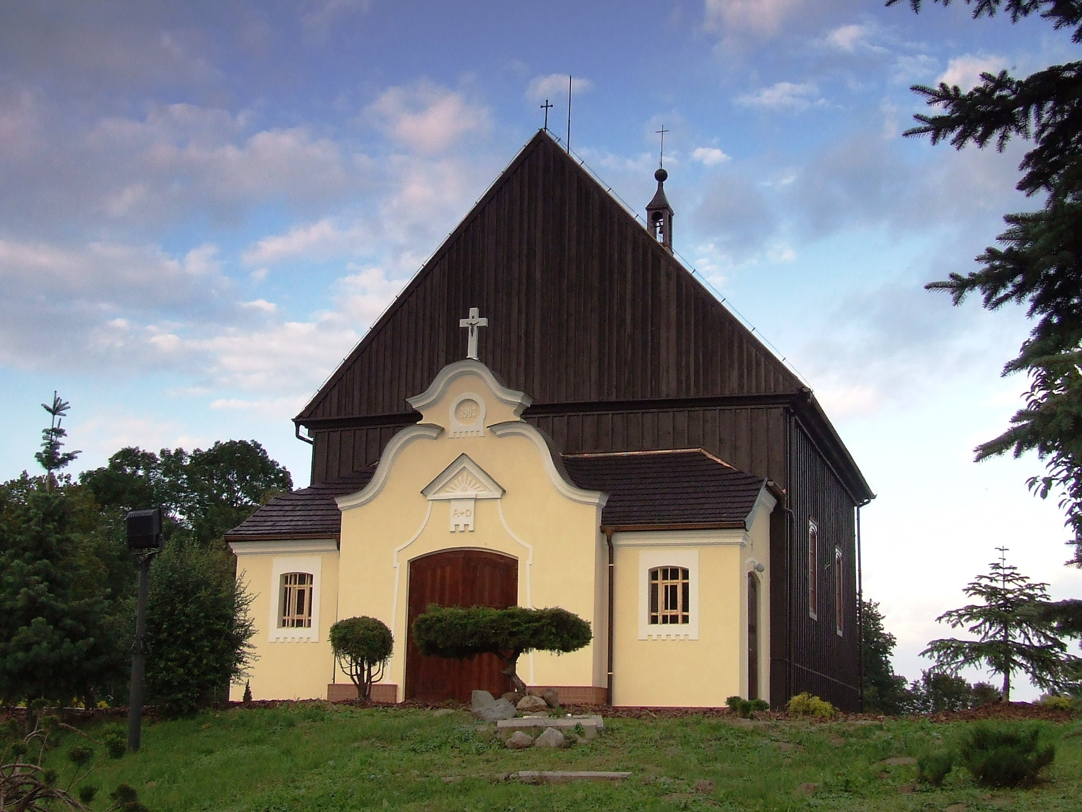 Kościół p.w. św. Wawrzyńca w Mącznikach (powiat średzki).